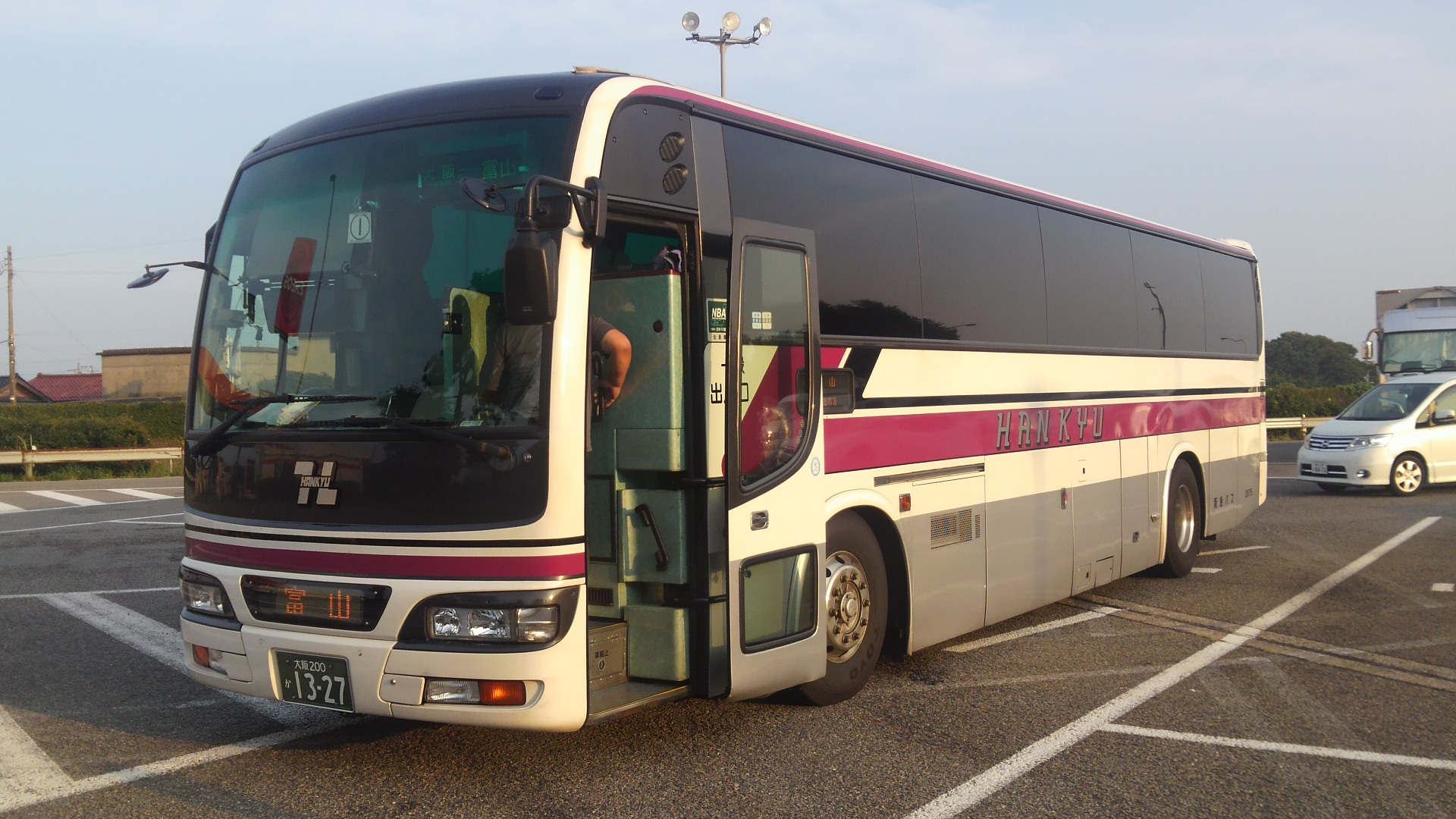 開業以来12年余り活躍してきた、阪急バスの大阪～砺波・富山線初代専用車。尼御前サービスエリアで休憩中。